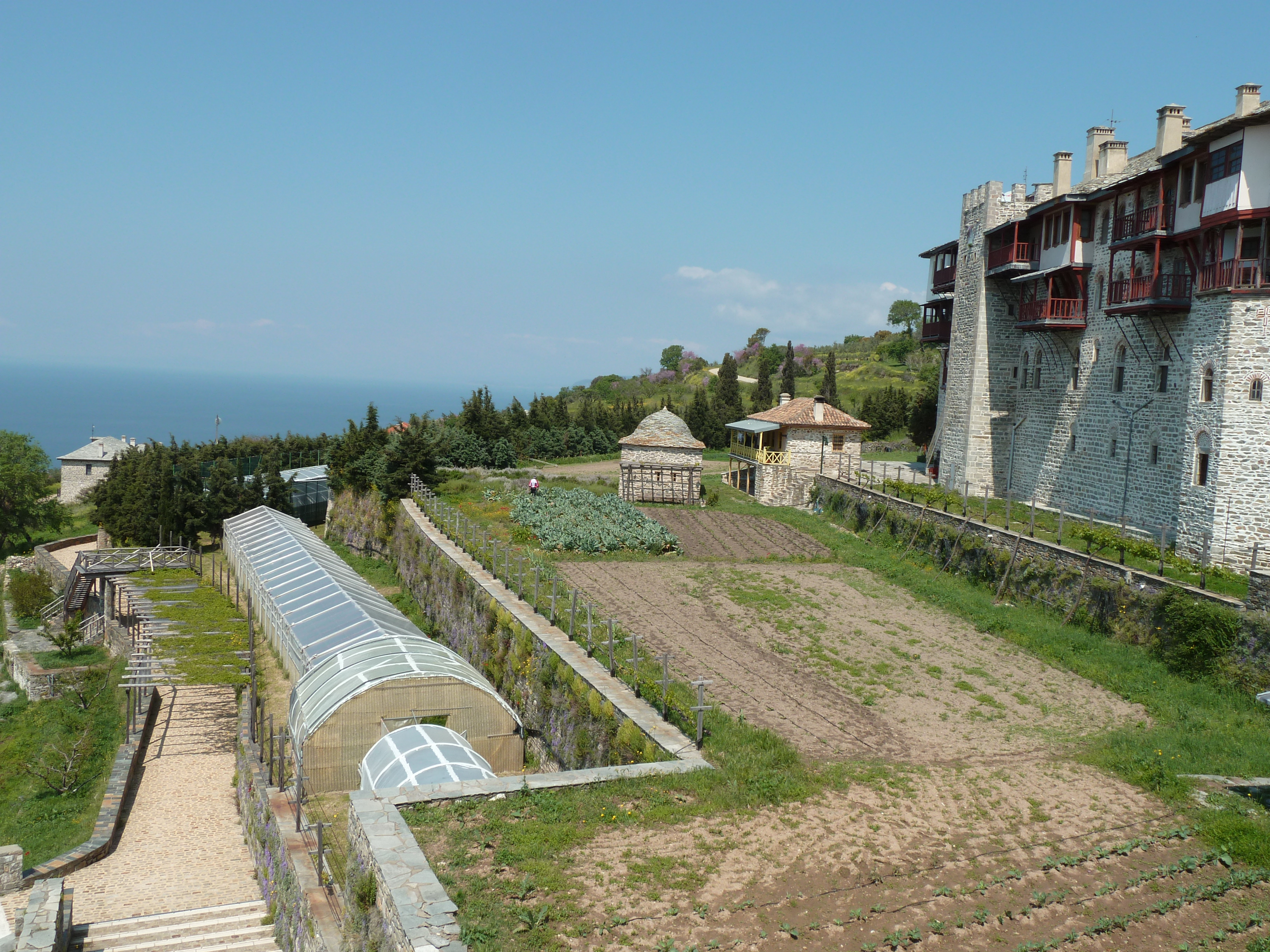 Jardins du monastère de Xeropotamou (Mont Athos)